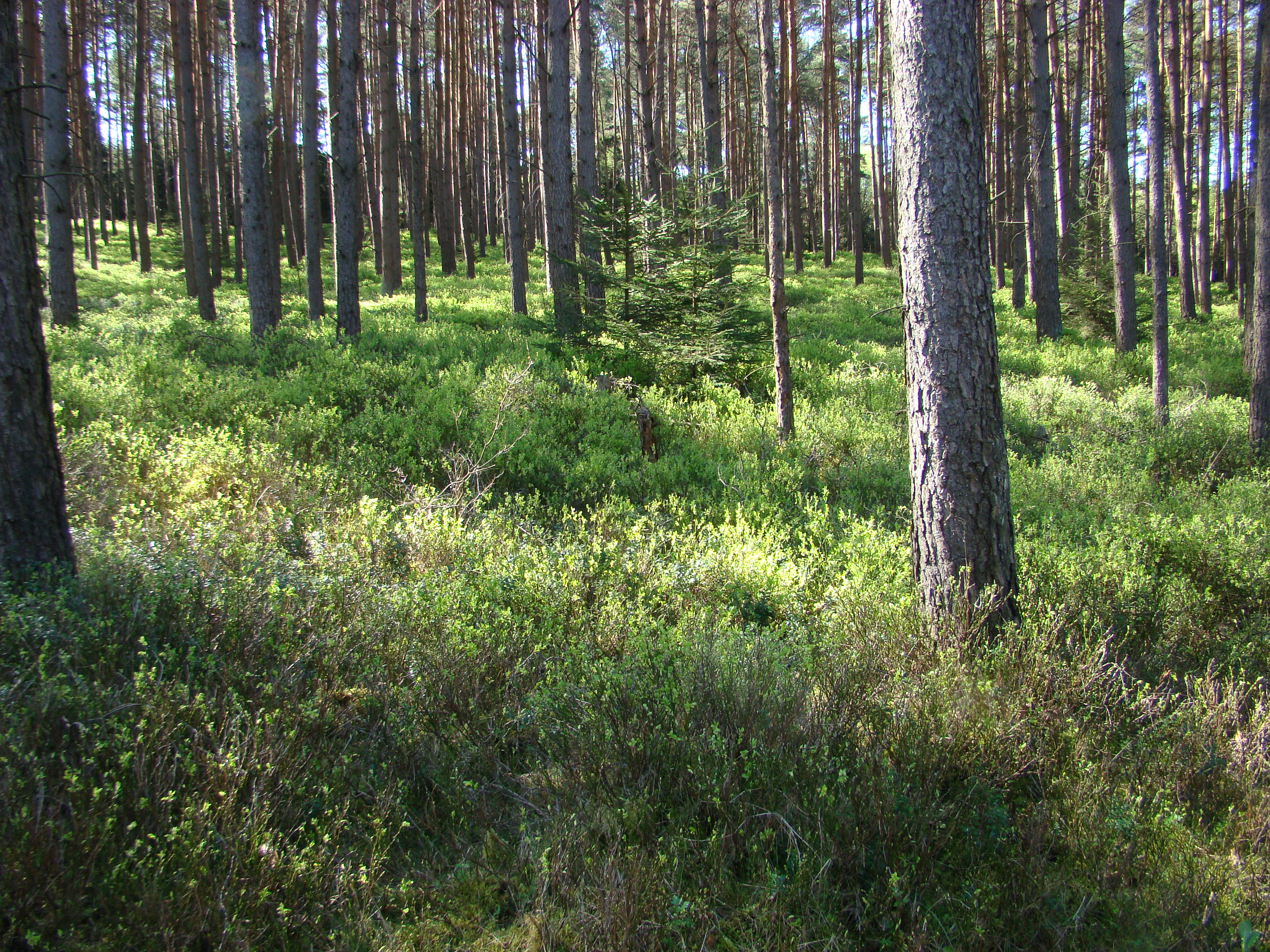 Kiefernwald mit Blaubeerpflanzen